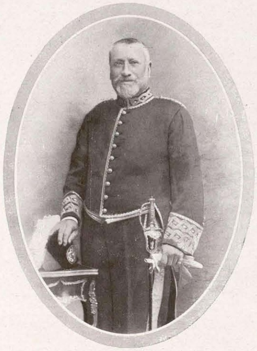 Francos Rodríguez, por Kaulak.